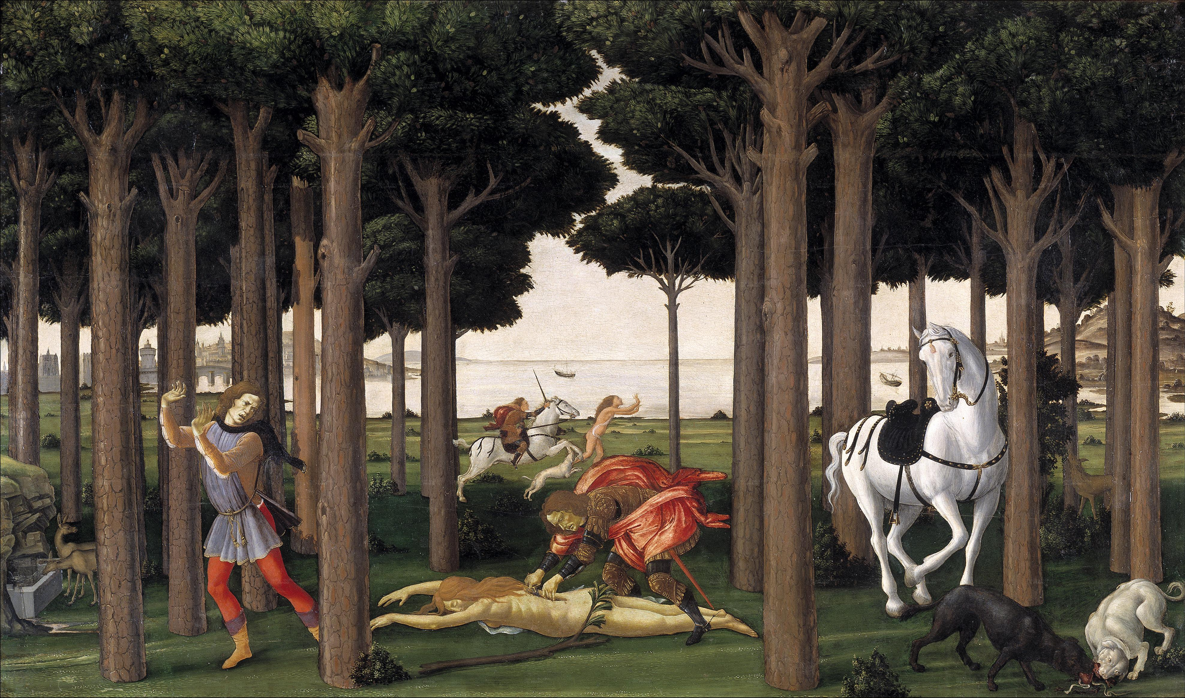 Nastagio Degli Onesti na visão de Sandro Botticelli. Parte 2: A Caçada Infernal